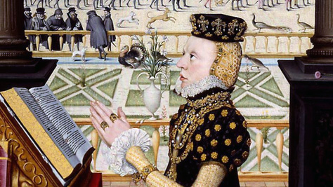 Ausschnitt aus einem Porträt Dorotheas von Dänemark, Herzogin von Braunschweig-Lüneburg, auf dem rechten Altarflügel in der Celler Schlosskapelle